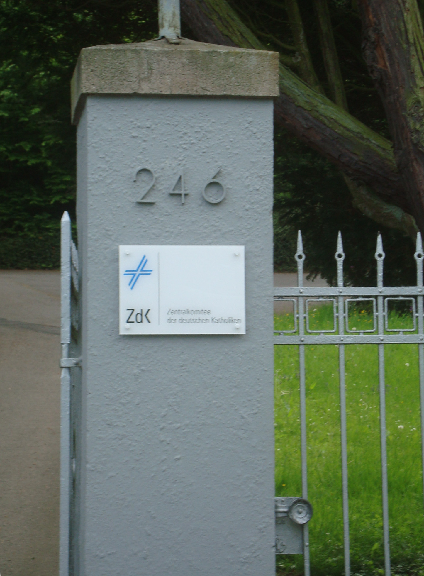 Eingang zum Grundstück des Zentralkomitees der deutschen Katholiken, Hochkreuzallee 246, Bonn-Friesdorf